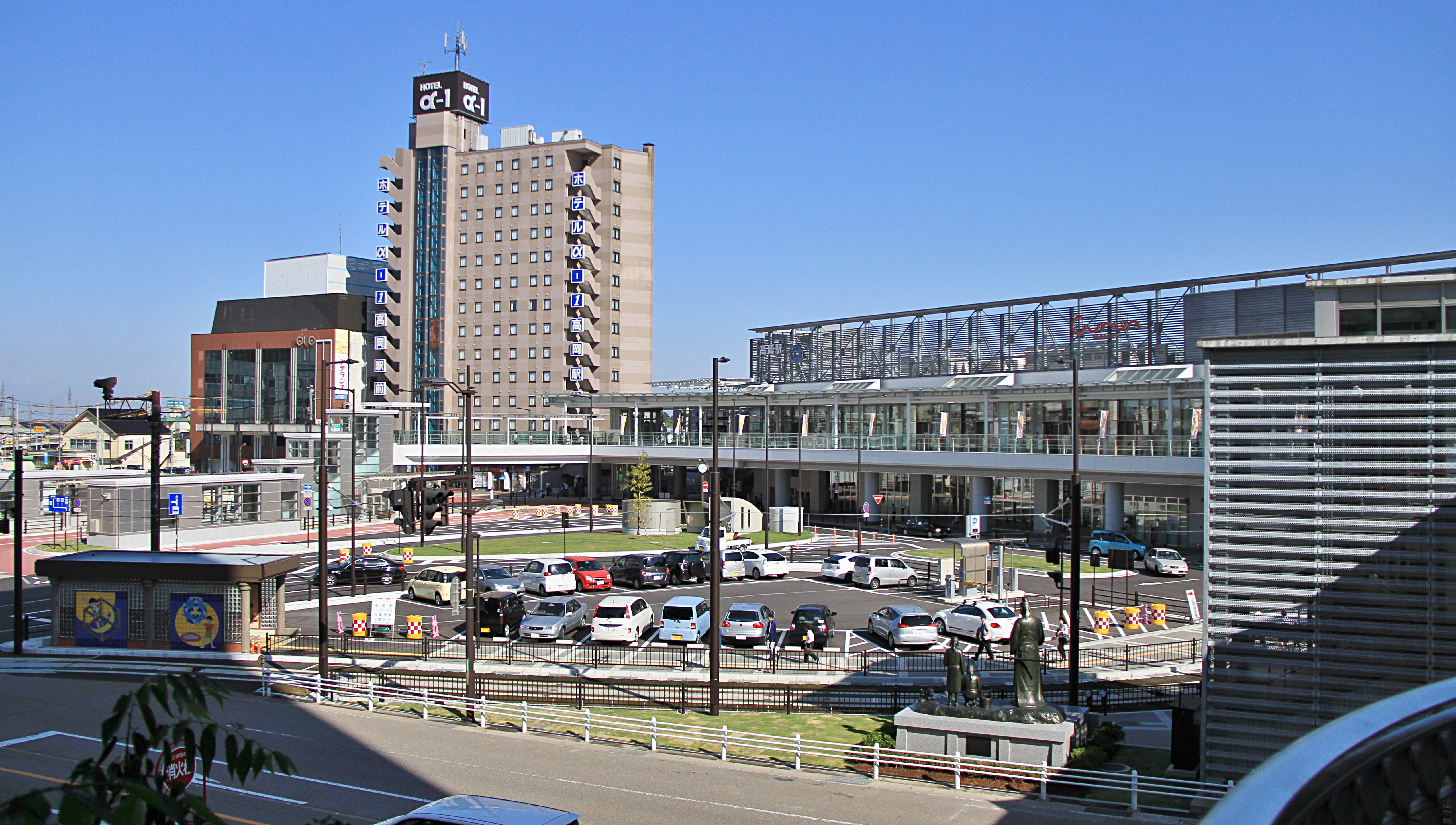 高岡駅古城公園口